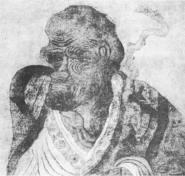 L'arhat Pindola Bharadvaja, détail d'un rouleau mural, encre sur soie, daté 894. 90x45cm. Collection de la Maison impériale japonaise. Tōkyō